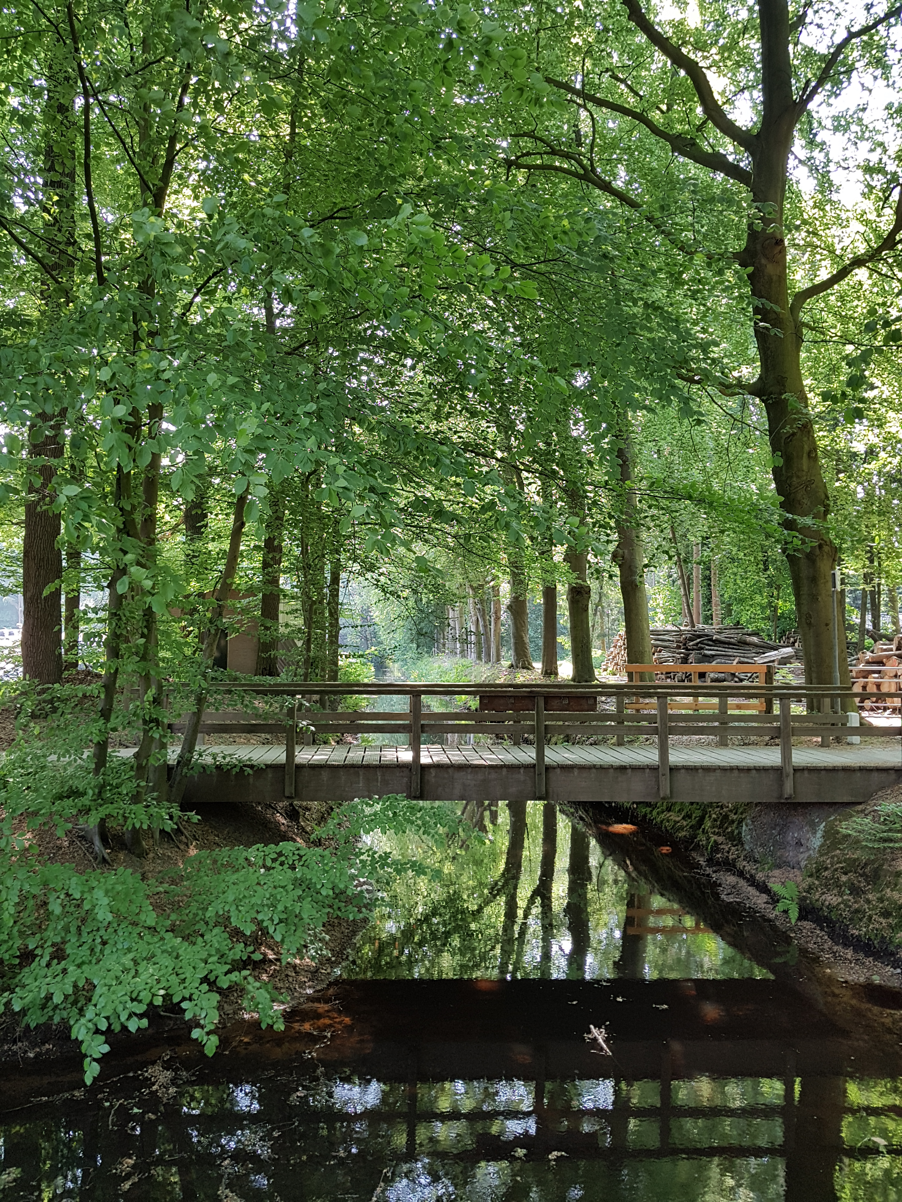 Praamgracht of Pijnenburger grift